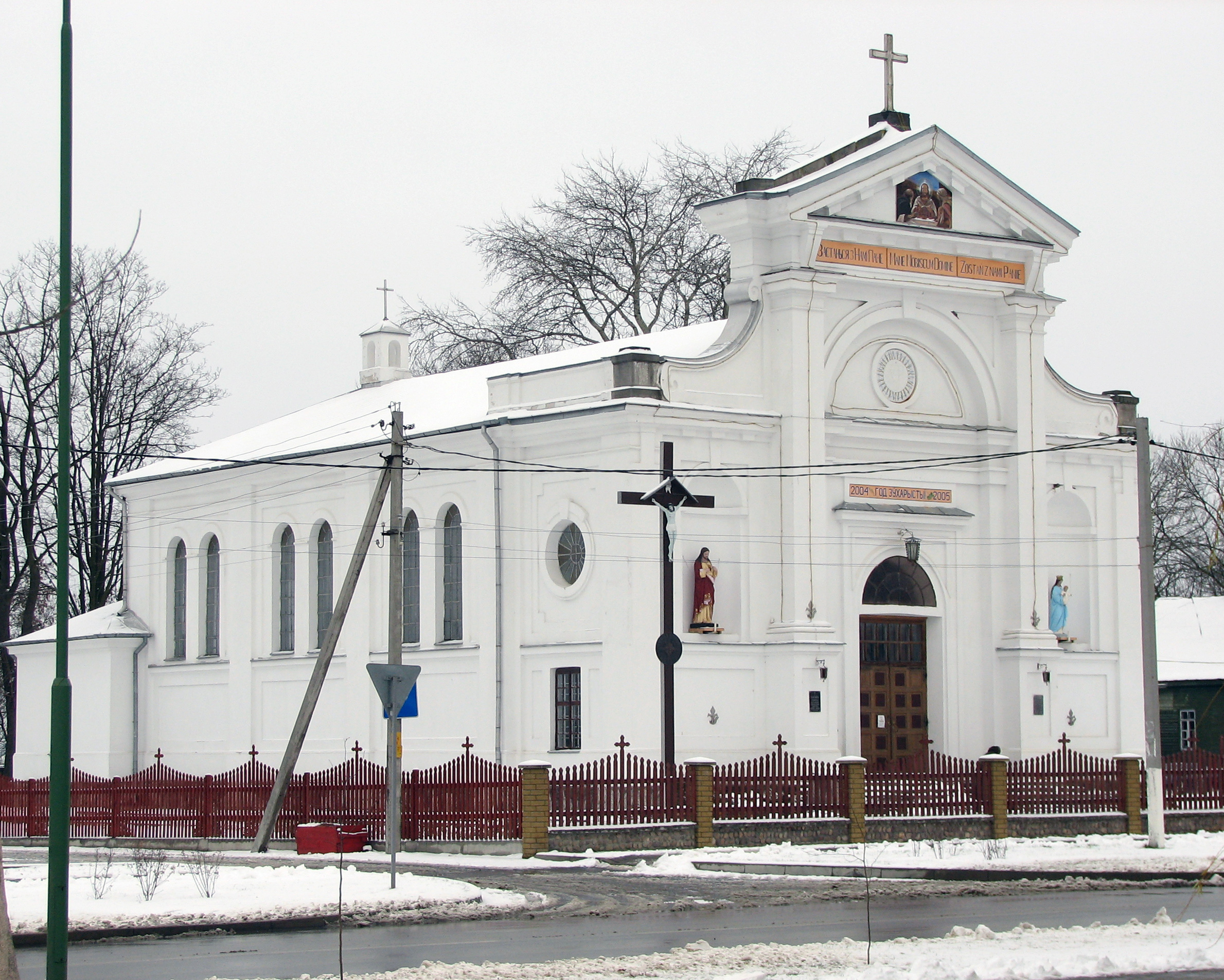 Беларуская (тарашкевіца): Касьцёл Унебаўзяцьця Найсьвяцейшай Панны Марыі (Пружаны)